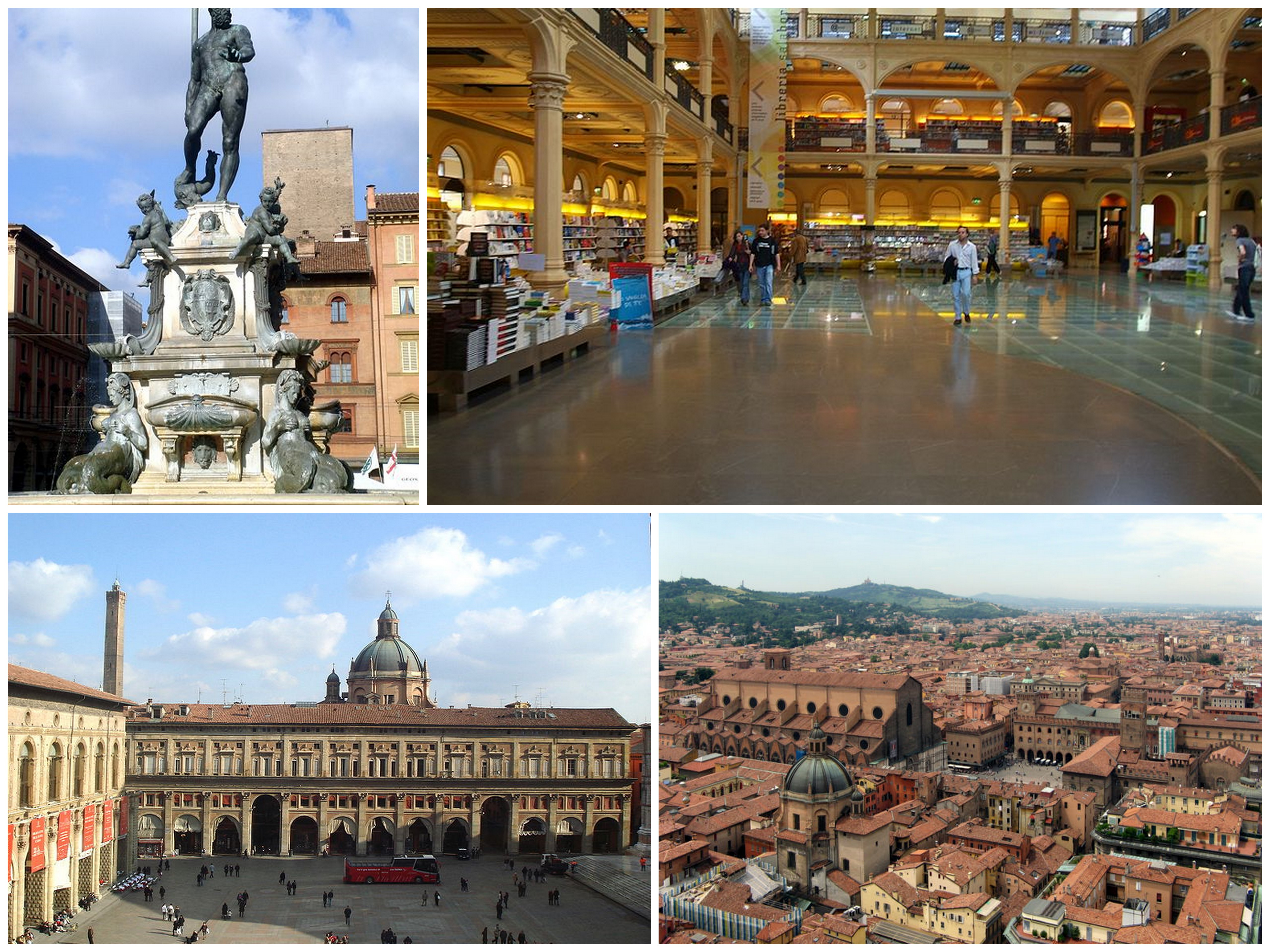 Collage di varie foto di Bologna